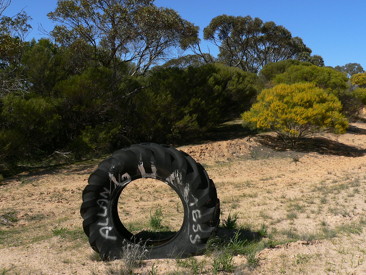 Paruna to Pinnaroo Road